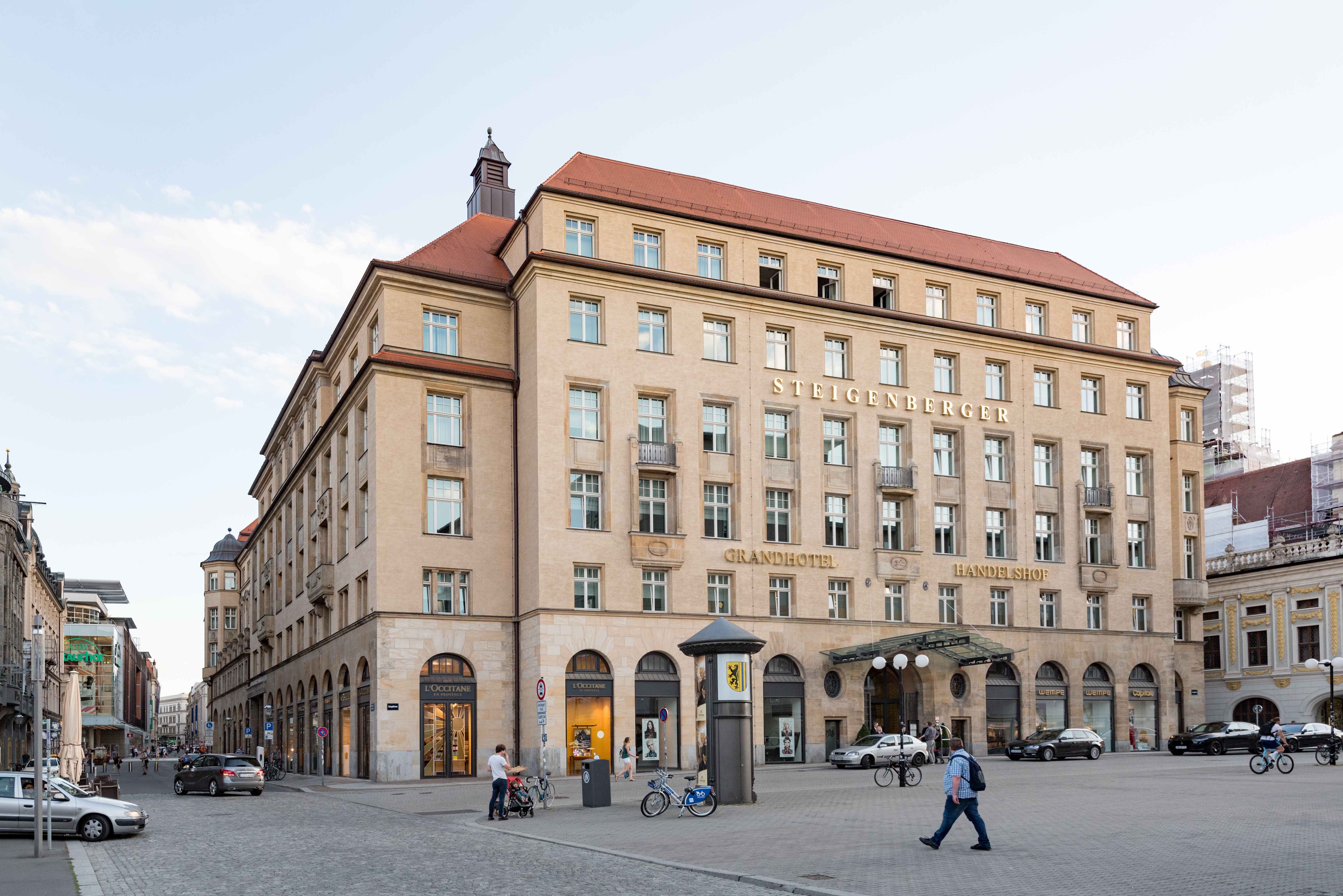 Leipzig, Salzgäßchen 6